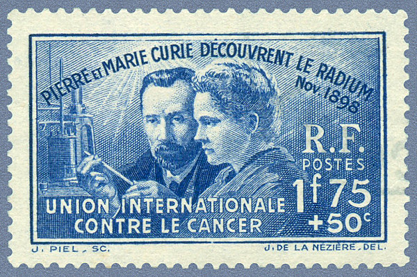 Timbre de 1938 : Pierre et Marie Curie découvrent le radium